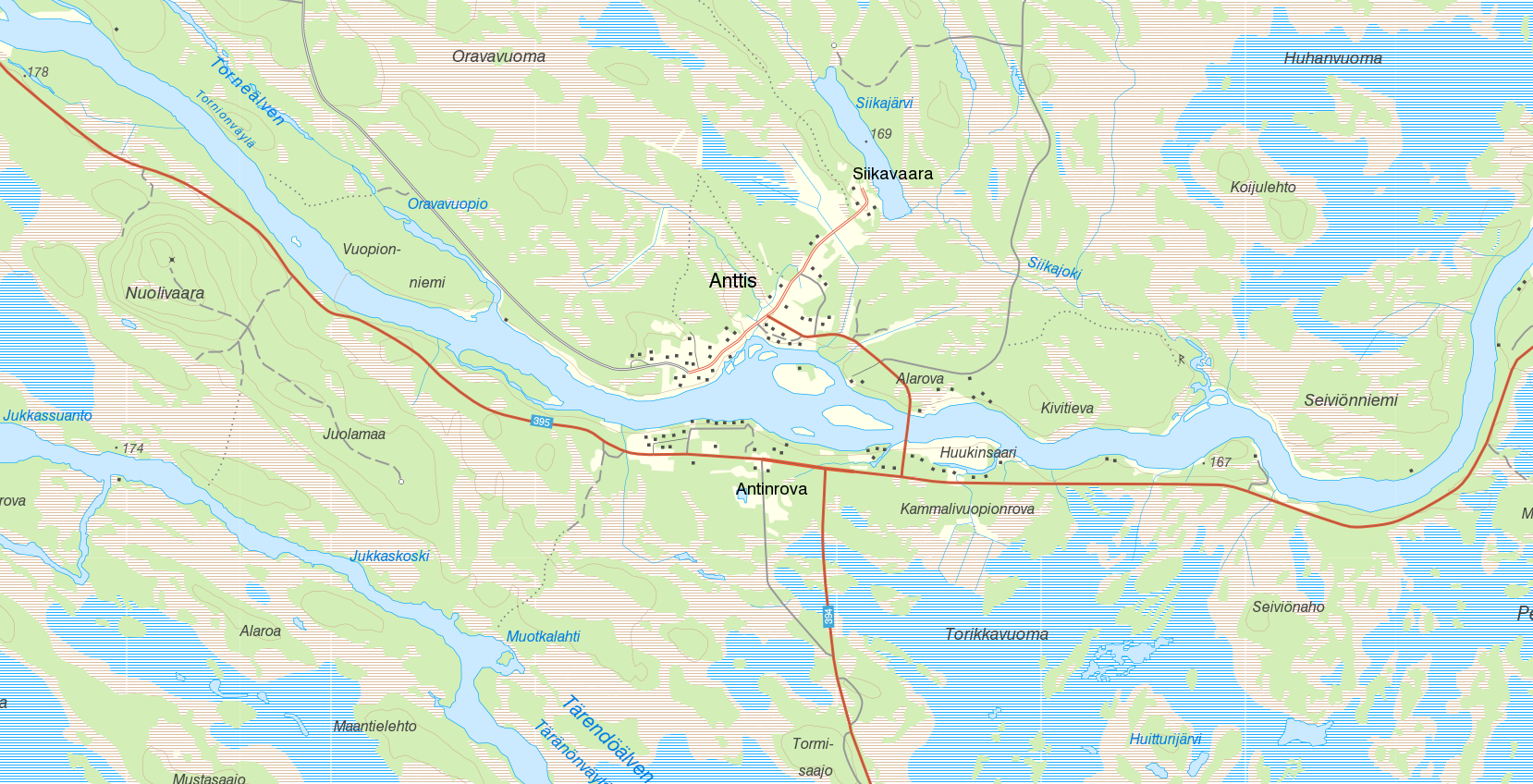 Orterna Anttis, Antinrova och Siikavaara. Bakgrundskarta från Lantmäteriet, skala 1:30 236.